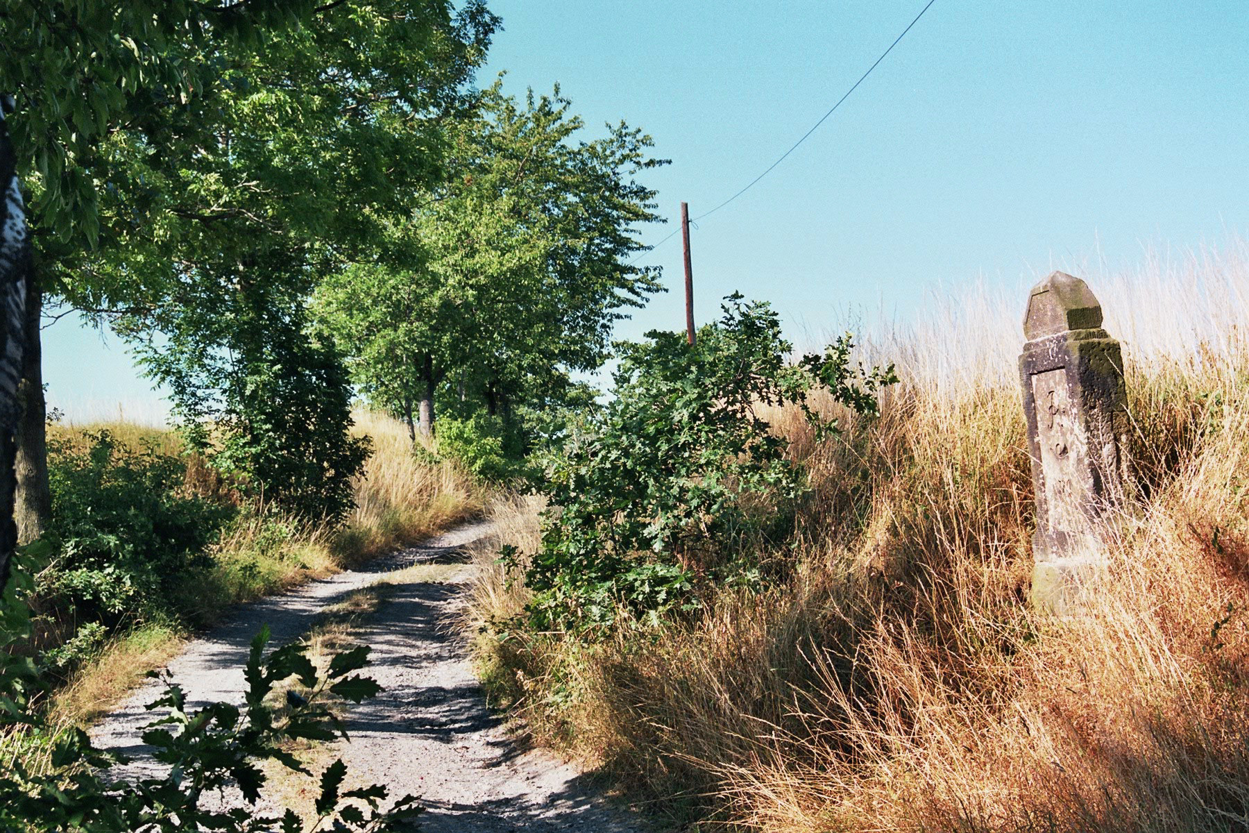 Eulmühle (Gemeinde Bahretal): Viertelmeilenstein Nr. 9 der Alten Dresden-Teplitzer Poststraße aus dem Jahr 1729.